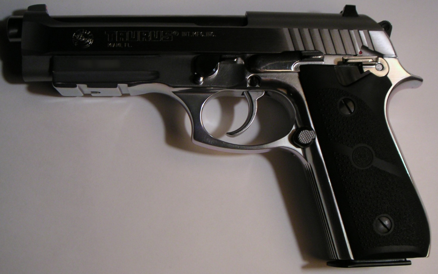 Taurus PT92 AFS in stainless steel.